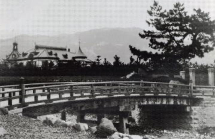 かつてあった久原財閥創始者・久原房之助の邸宅